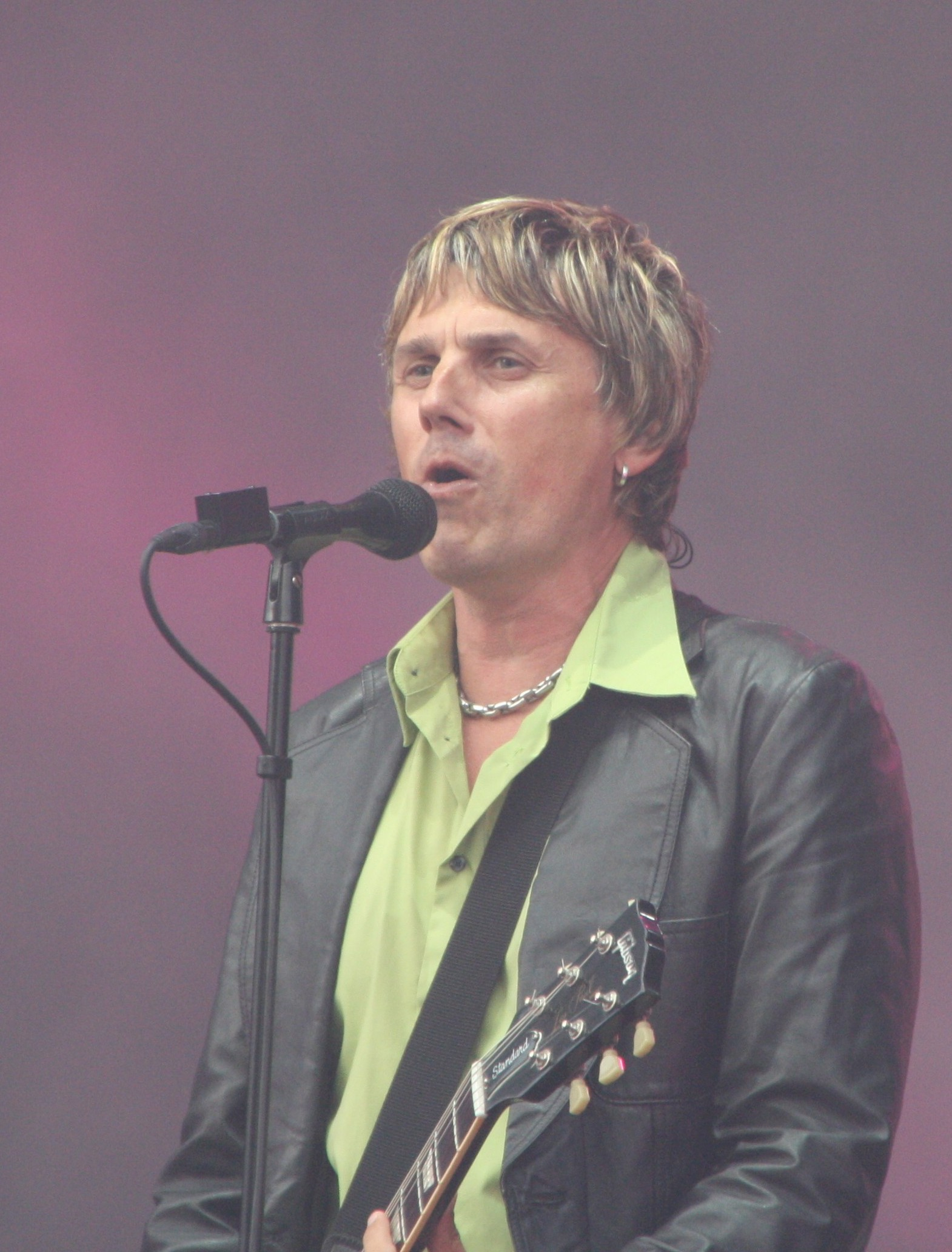 Hendrik Sal Saller esinemas koos ansambliga Smilers Tallinna Lauluväljakul Õllesummeril 2009